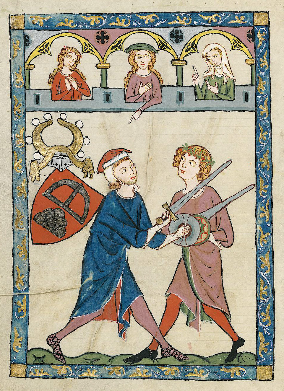 Codex Manesse, UB Heidelberg, Cod. Pal. germ. 848, fol. 190v: Herr Johann von Ringgenberg